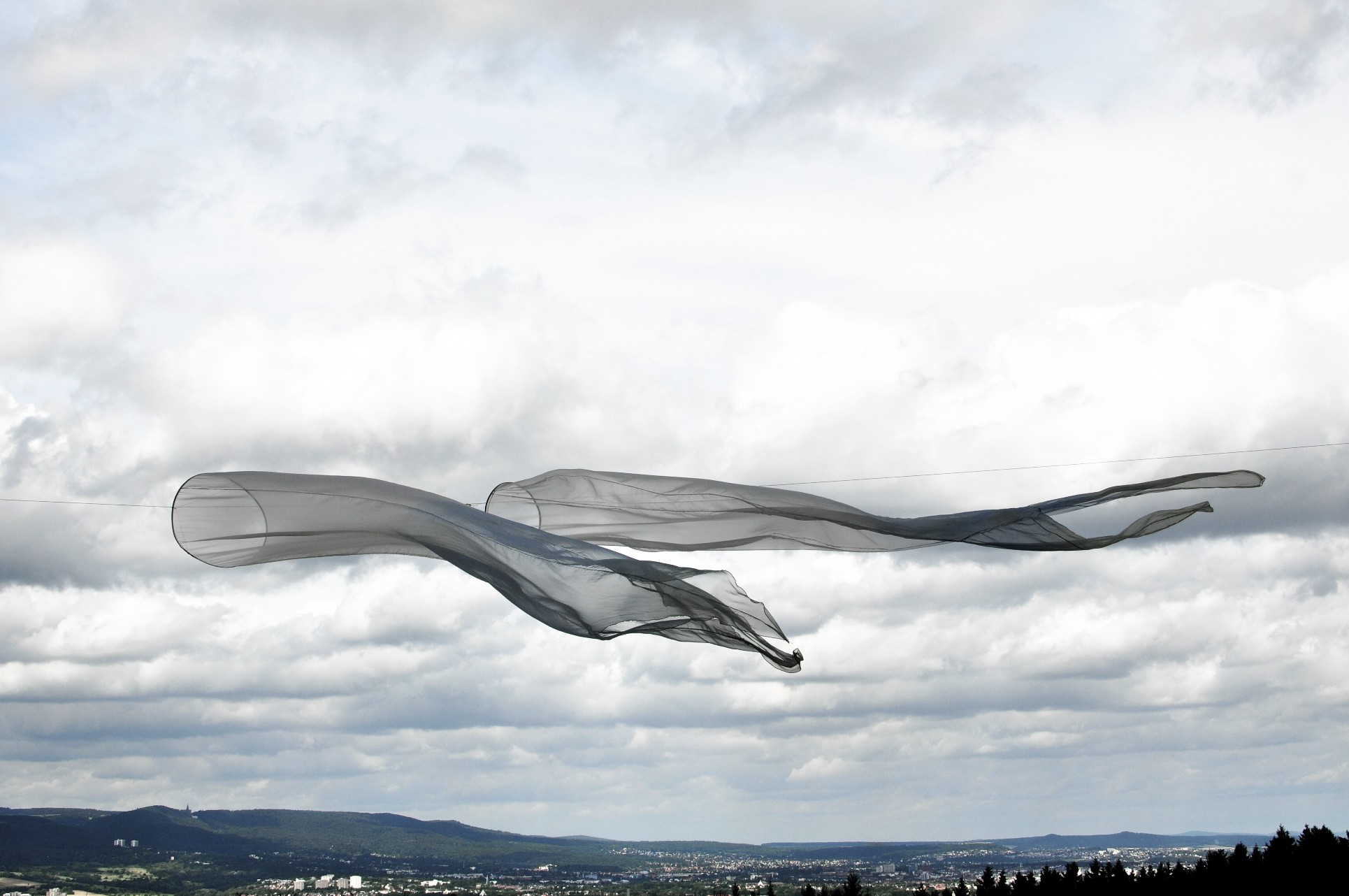 Installation beim 7. bewegten wind , Kassel